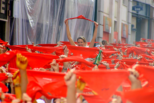 Chupinazo, Pamplona, 6 de julio